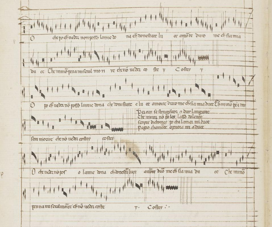 Codex Reina